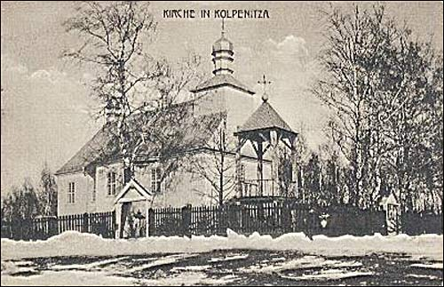 Царква на германскай паштоўцы (1915-1918)